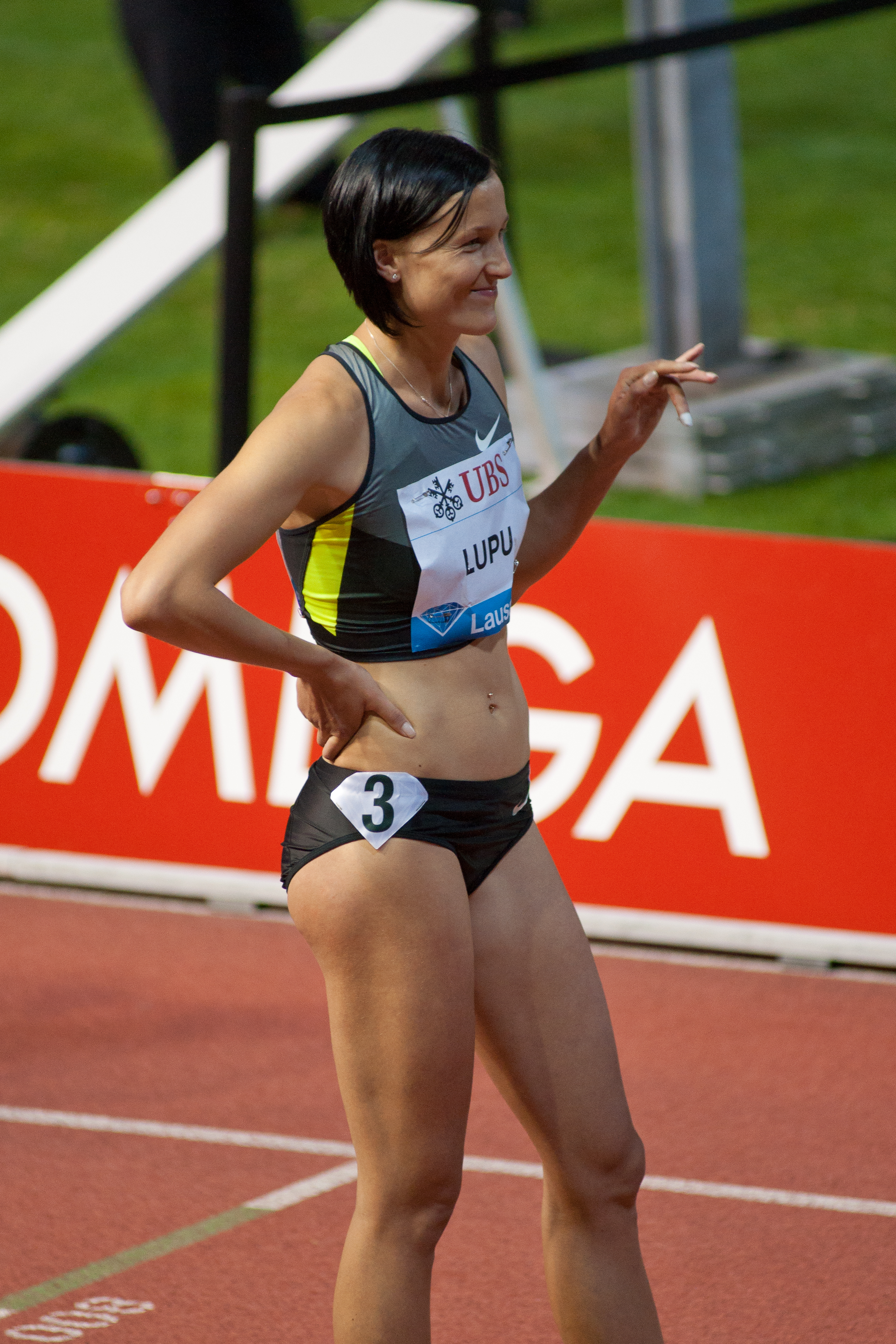 Athletissima 2012 - Nataliya Lupu